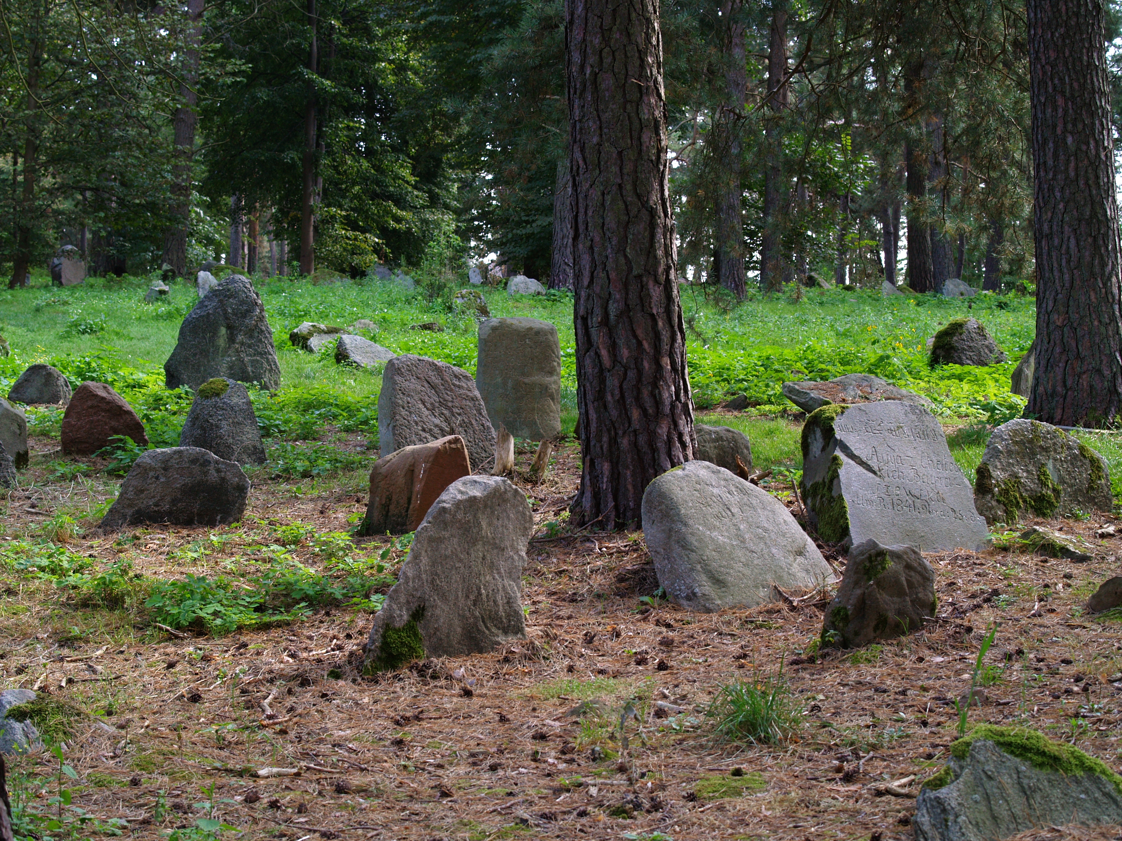 Cmentarz muzułmański, 2 poł. XVII, zabytek Kruszyniany, Krynki 12.1986.